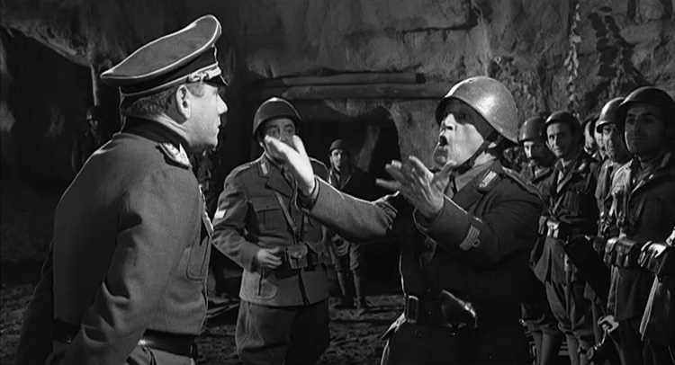 Totò nel film I due colonnelli. Il maggiore tedesco Kruger (Roland Von Barthrop), non riuscendo ad ordinare al colonnello Di Maggio (Totò) di aprire il fuoco sulla popolazione civile, lo minaccia: "Badate colonnello, io ho carta bianca". Di Maggio replica: "e ci si pulisca il culo!"